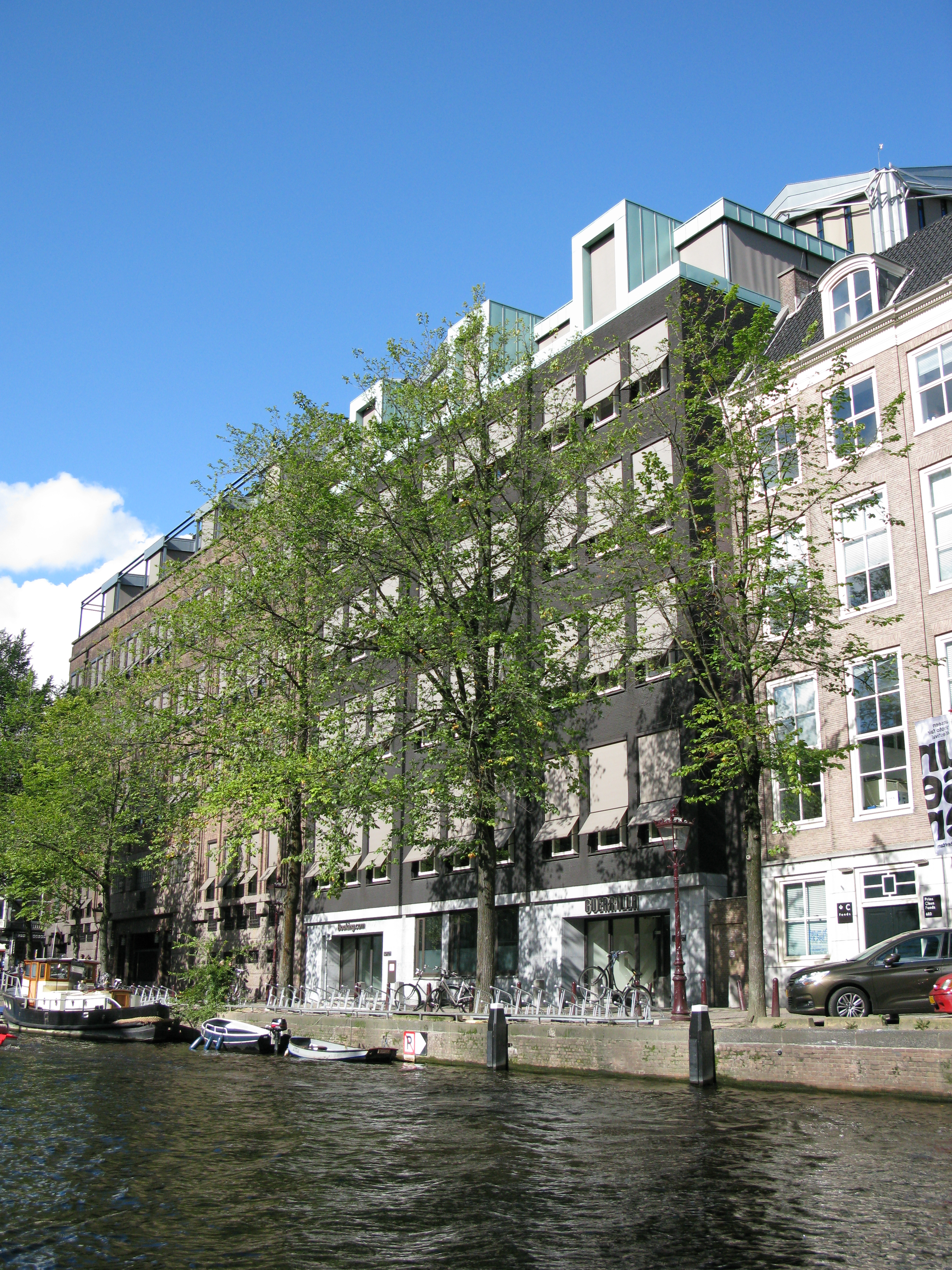 Headquarters Amsterdam（entrance side）